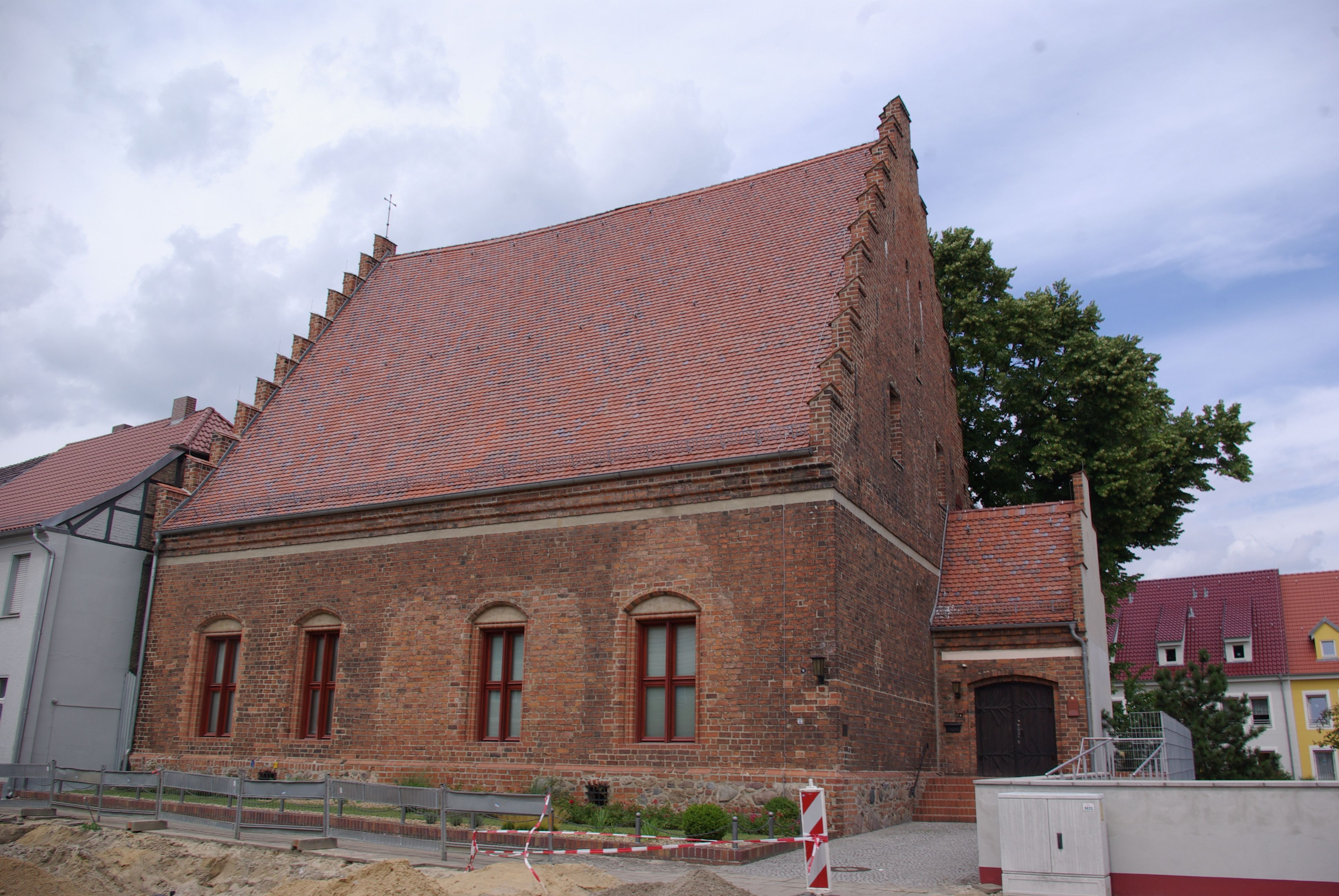 Jüterbog in Brandenburg. Das Haus steht in der Straße Planeberg 9. Das Gebäude ist der Abtshof des Klosters Zinna und steht unter Denkmalschutz.